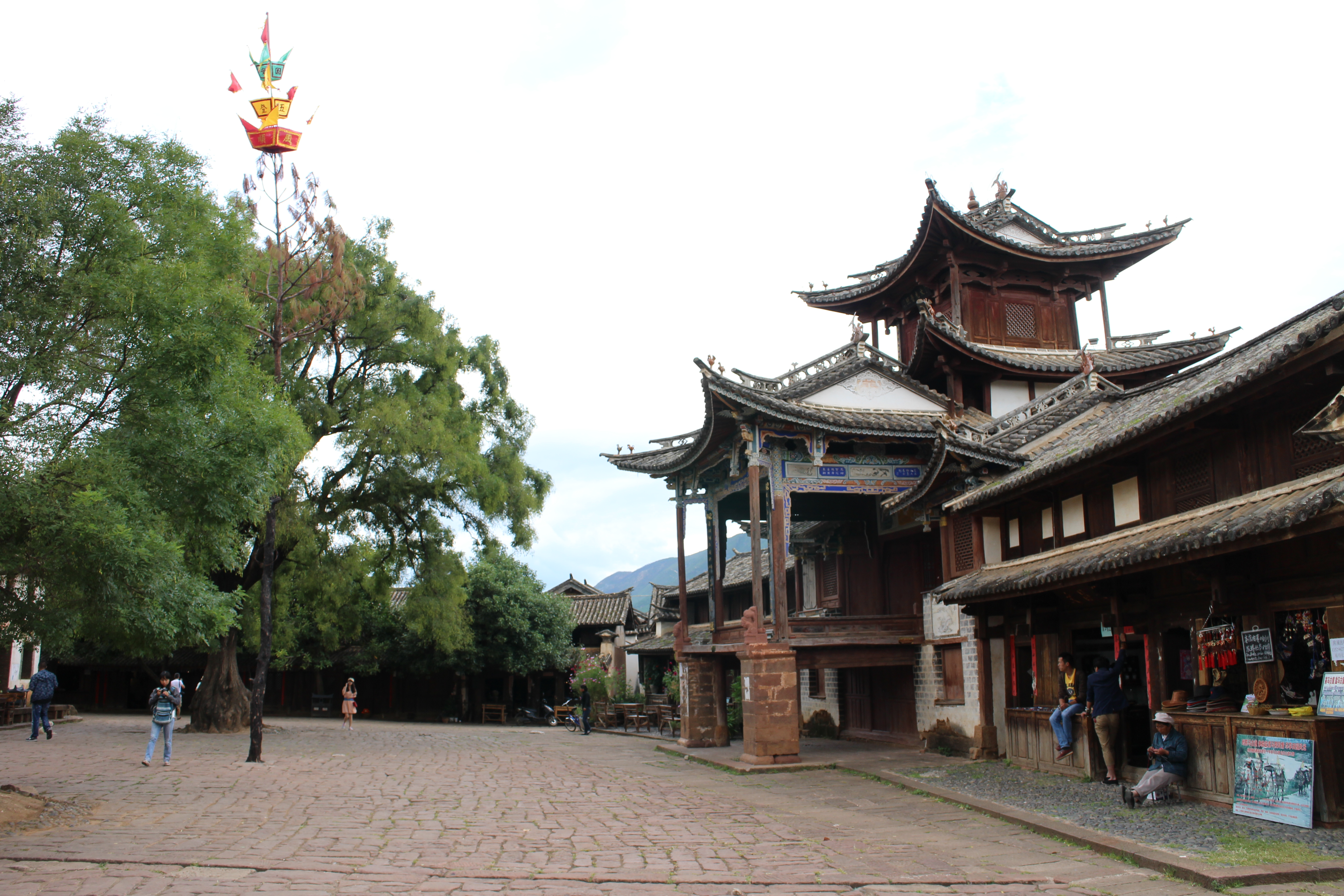 中文（中国大陆）: 茶马古道寺登街段（寺登街魁阁）